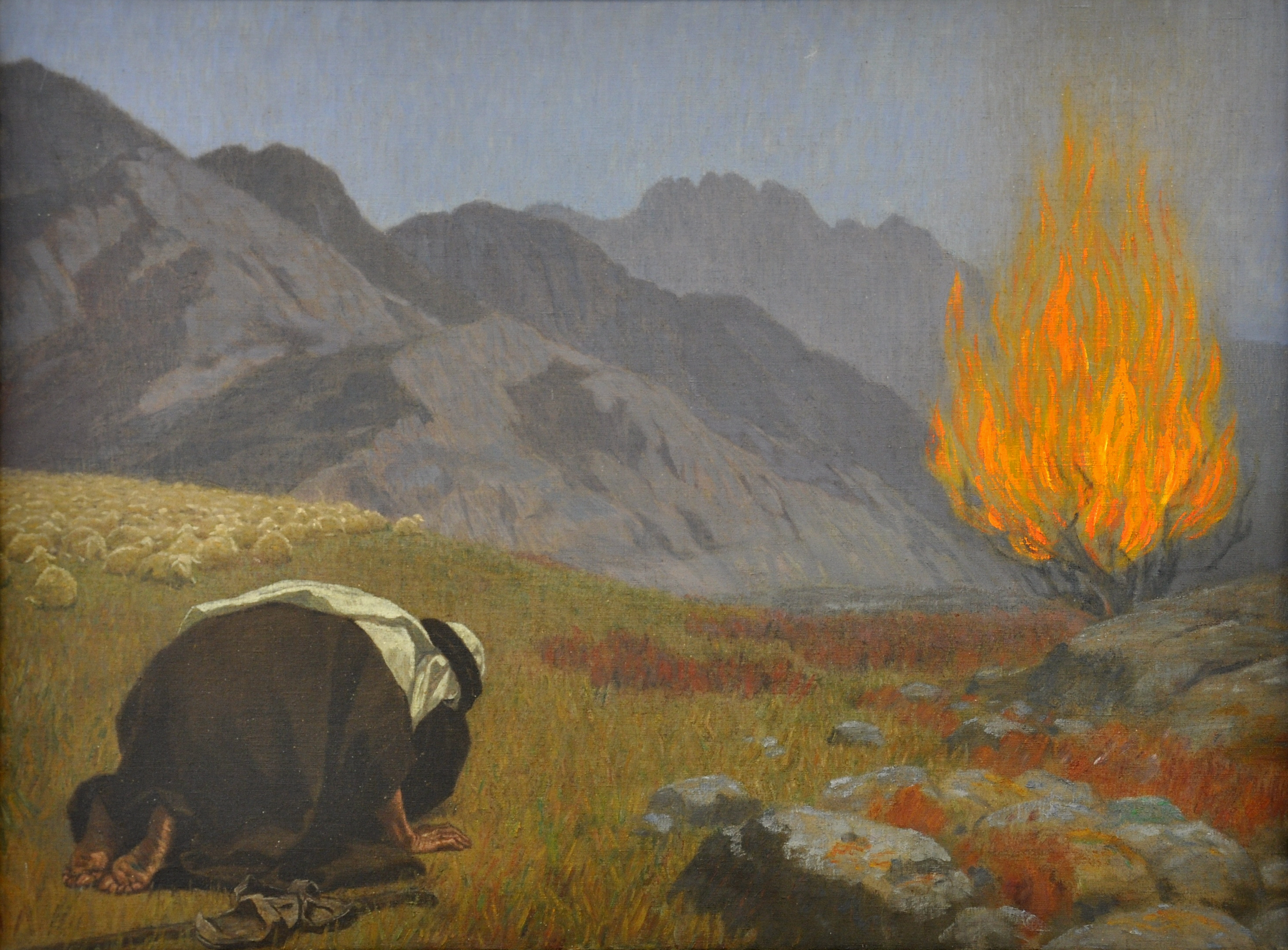 Moses vor dem brennenden Dornbusch, um 1920, Diözesanmuseum Freising, Inv. D 94117